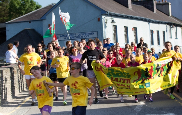 Ras yr Iaith 2014 yn mynd drwy Gastellnewydd Emlyn